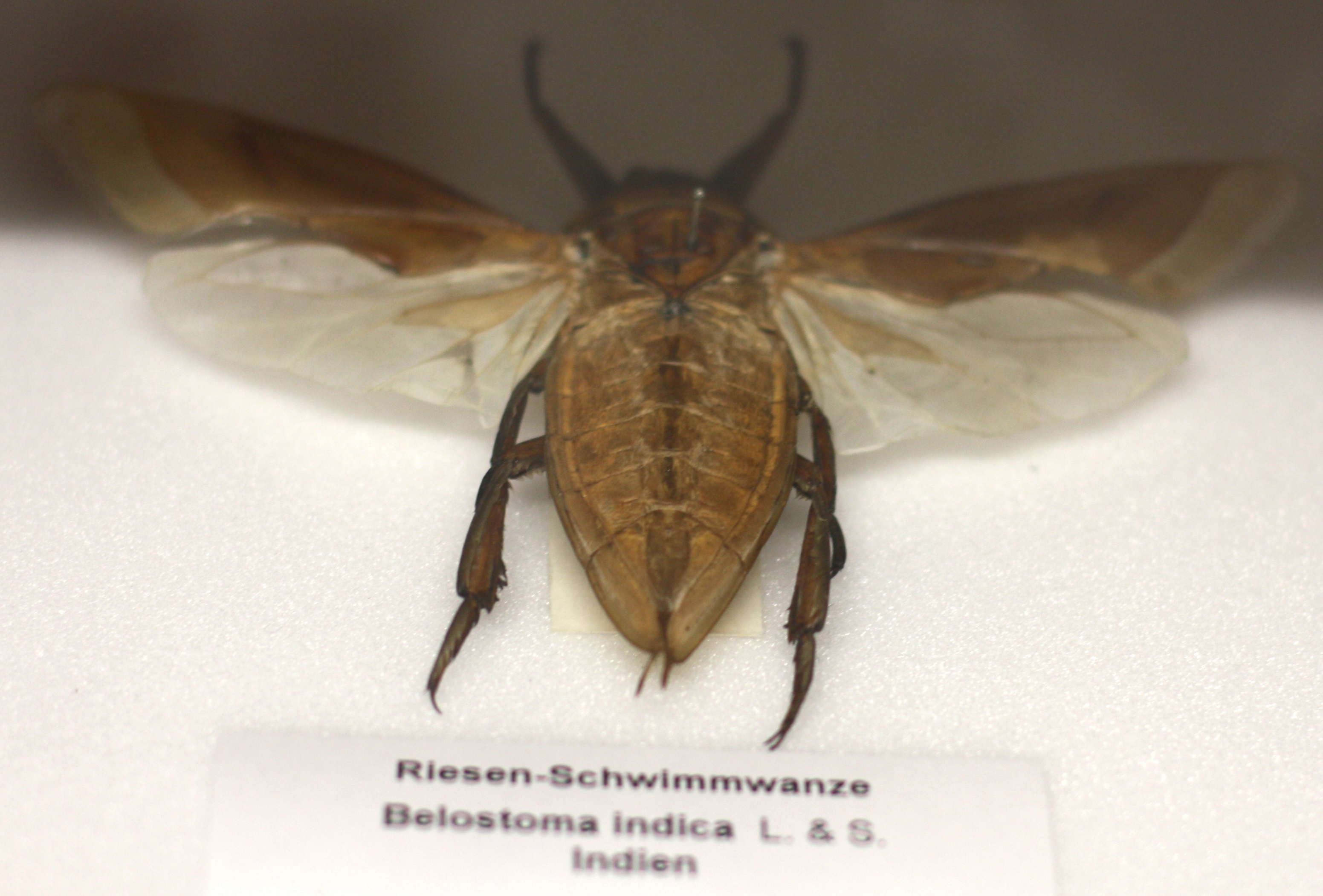 Naturkundliche Sammlung Übermaxx Überseenuseum Bremen; Schmetterlinge und andere Belostoma indica (Le Peletier & Serville)